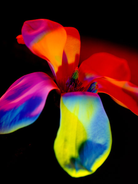 Eliška Bartek. Bílá magnolie nasvetlena filtry a analog ofocena rollfilmem a pentax kamera. Delana v Tessinu.